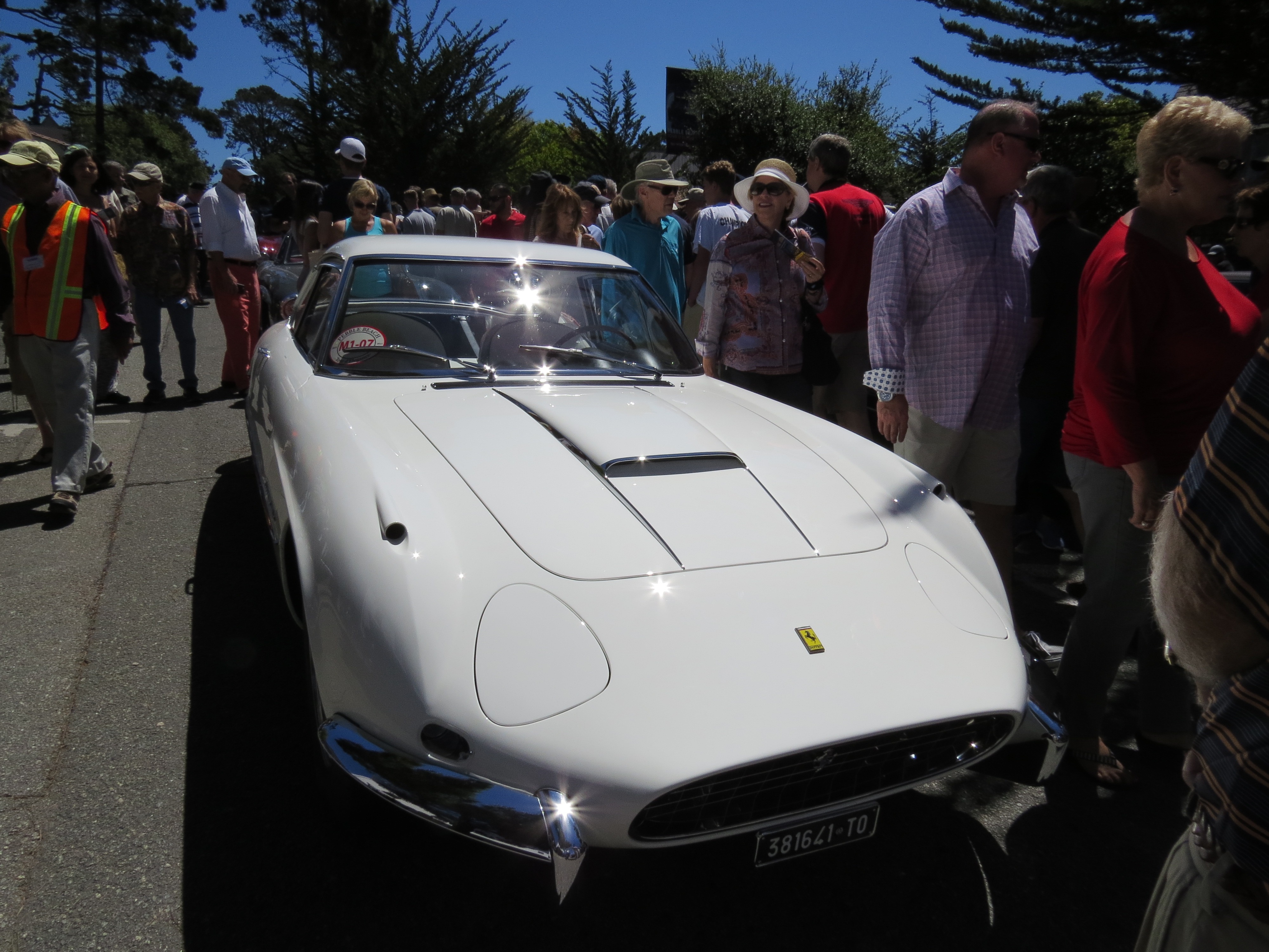 August 13, 2015